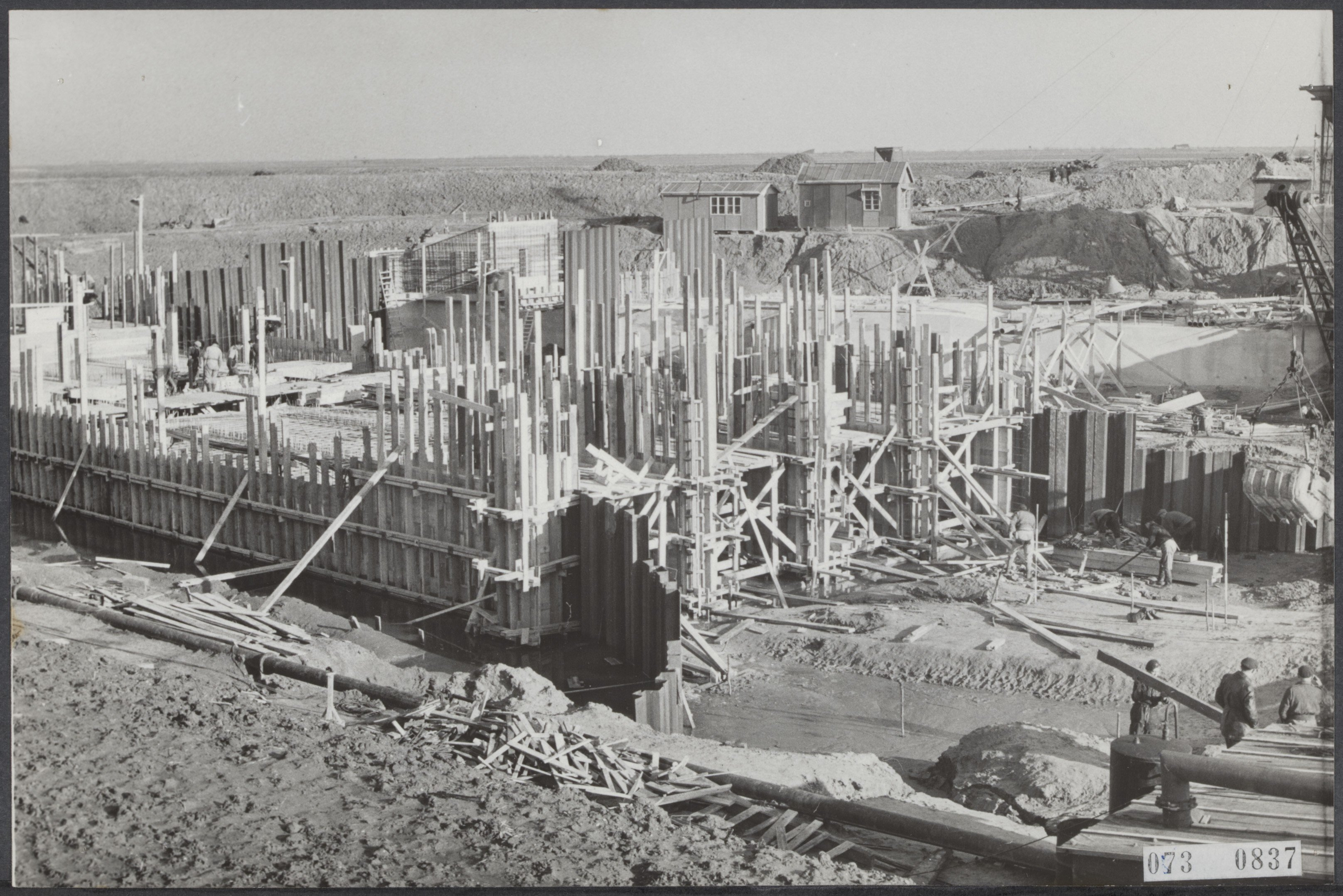 Collectie / Archief : Fotocollectie Elsevier Reportage / Serie : [ onbekend ] Beschrijving : begin werkzaamheden voor de drooglegging van de braakman Datum : 30 november 1951 Locatie : Zeeland, Zeeuws-Vlaanderen Trefwoorden : inpolderingen, sluizen, waterbouwkunde Persoonsnaam : braakman Fotograaf : Fotograaf Onbekend / Anefo Auteursrechthebbende : Nationaal Archief Materiaalsoort : Foto (zwart/wit) Nummer archiefinventaris : bekijk toegang 2.24.05.02 Bestanddeelnummer : 073-0837